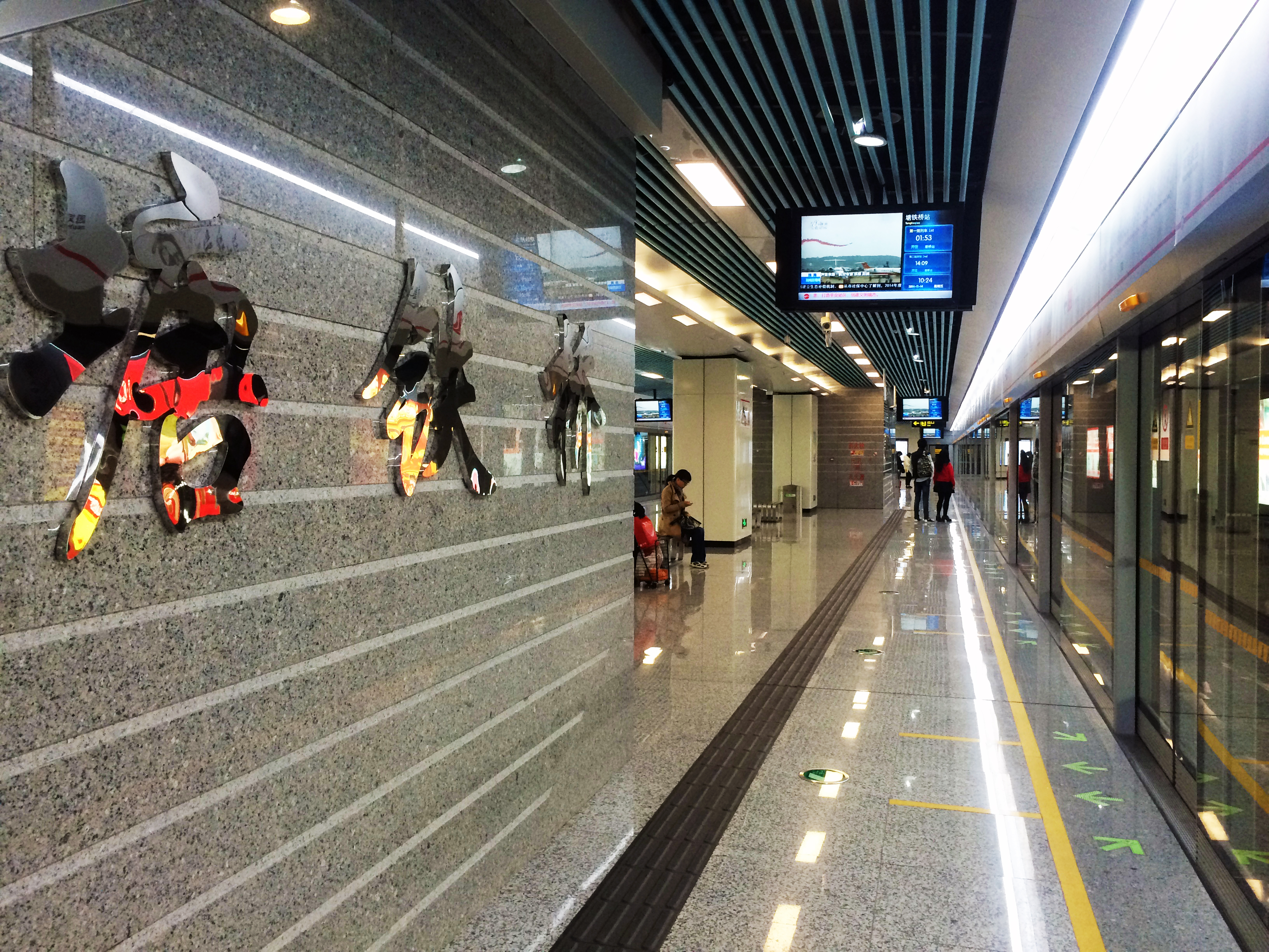 無錫地鐵1號線塘鐵橋站站臺